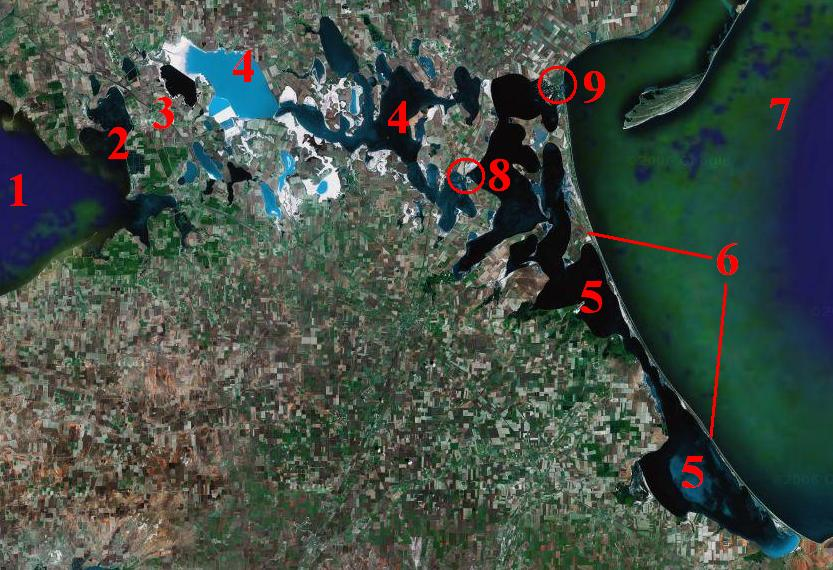 La golfo Sivaŝo vidata el kosmo. Per la ciferoj estas indikitaj: 1 - la Karkinita golfo de la Nigra maro; 2 - la Perekopa golfo; 3 - la Perekopa terkolo; 4 - la okcidenta parto de Sivaŝo; 5 - la orienta parto de Sivaŝo; 6 - la Arabata terlango; 7 - la Azova maro; 8 - la Ĉongara markolo; 9 - la Geniĉeska markolo